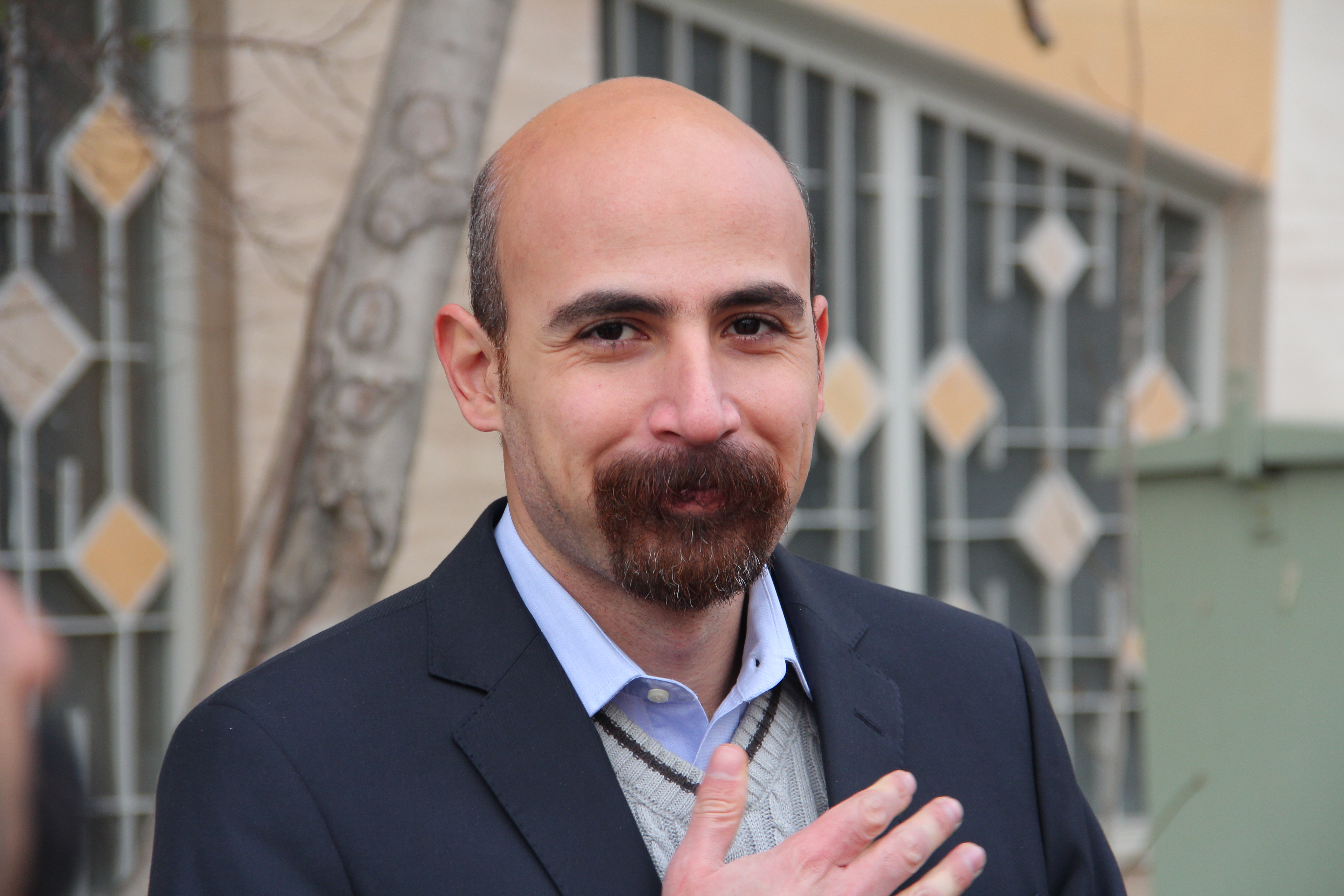 مصطفی عبدی در تهران ، گلستان هفتم.